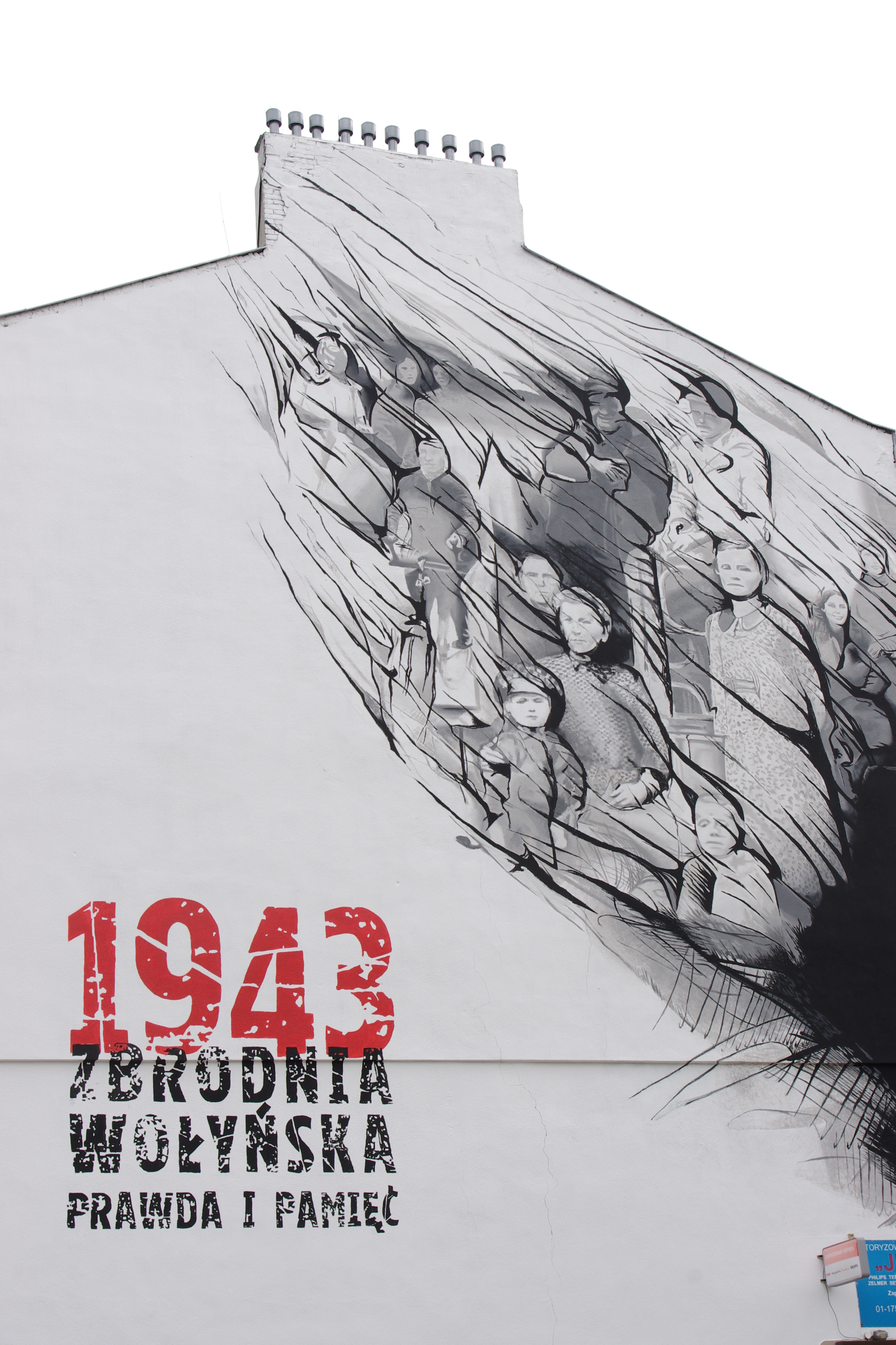 Mural „1943 Zbrodnia Wołyńska. Prawda i pamięć” odsłonięty 10 lipca, przy ul. Młynarskiej 34 w Warszawie z okazji 70 rocznicy Rzezi wołyńskiej